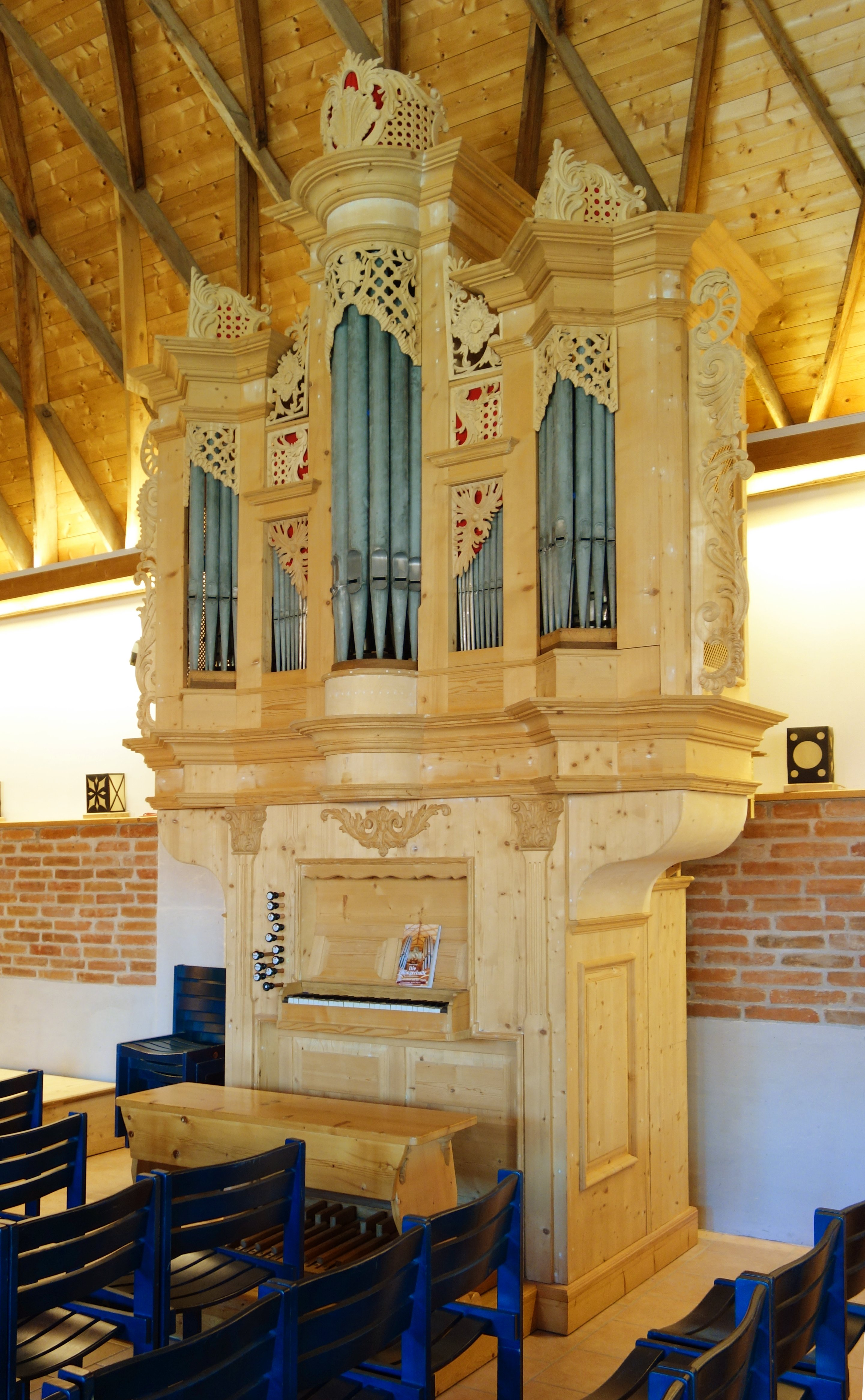 Die Bayr-Orgel im Orgelzentrum Valley (1745, Anton Bayr, I/11)